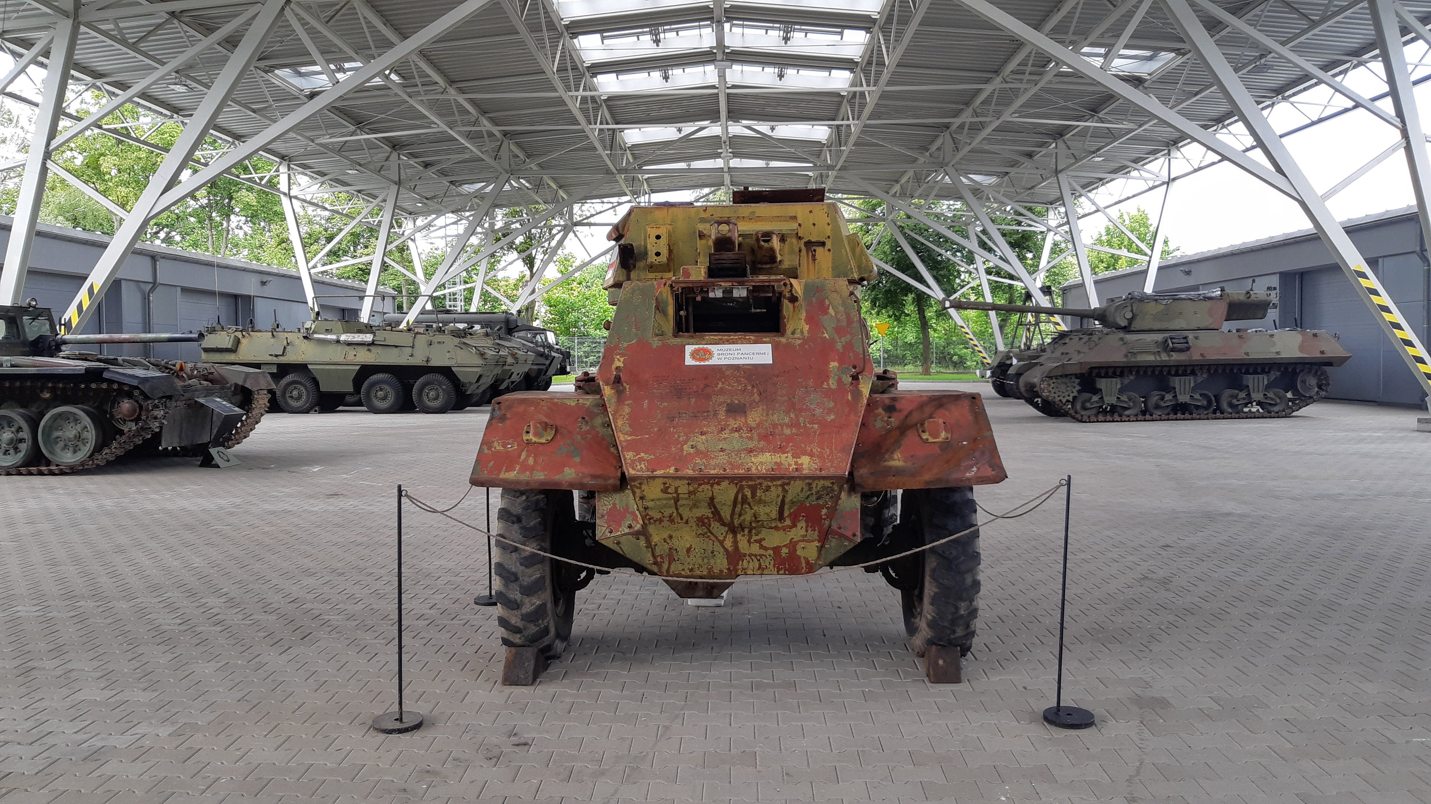 Lekki pancerny samochód rozpoznawczy Fox sprowadzony z Włoch, wystawiony w Muzeum Broni Pancernej w Poznaniu